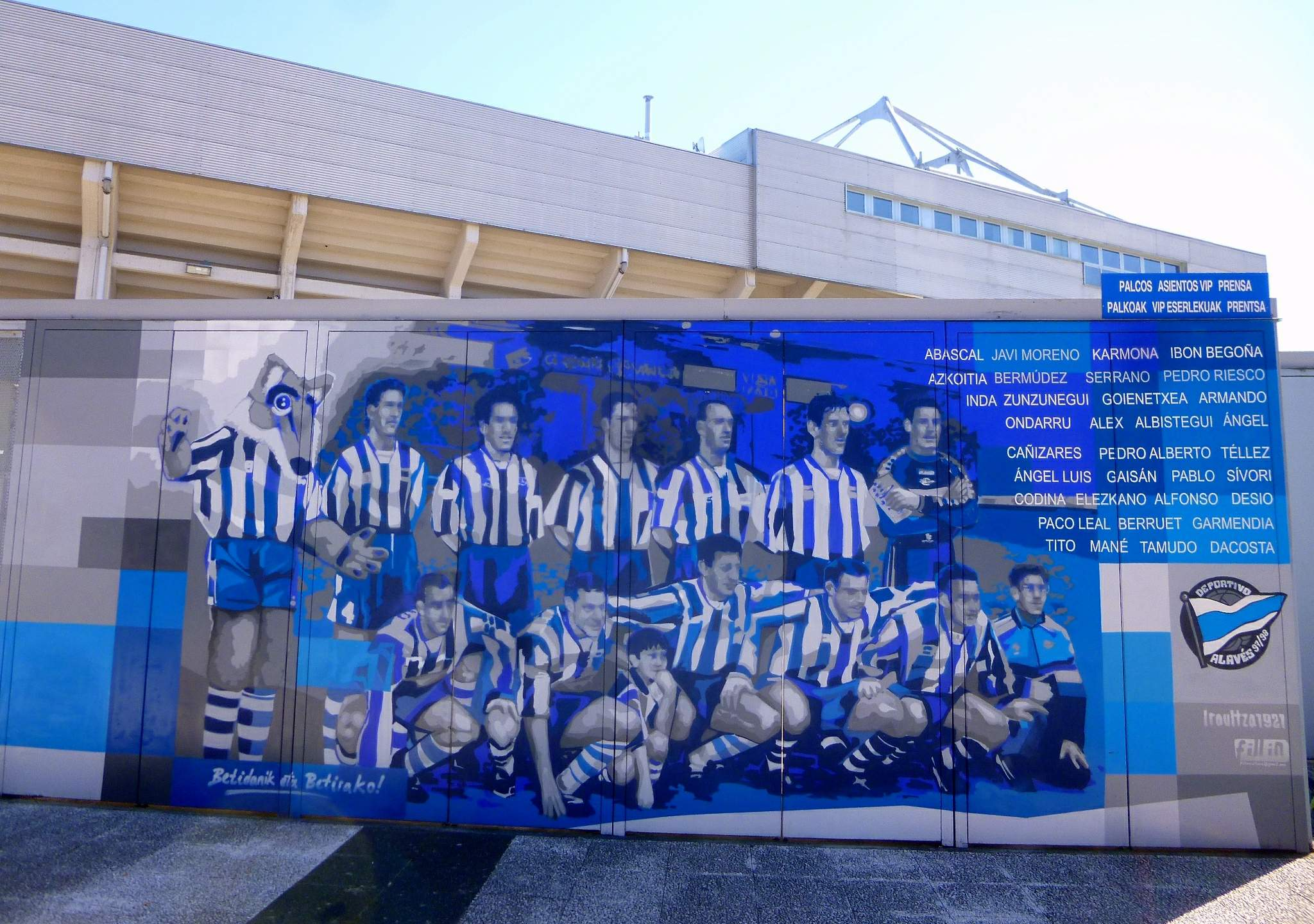 Estadio de Mendizorroza, campo del Deportivo Alavés (Vitoria)